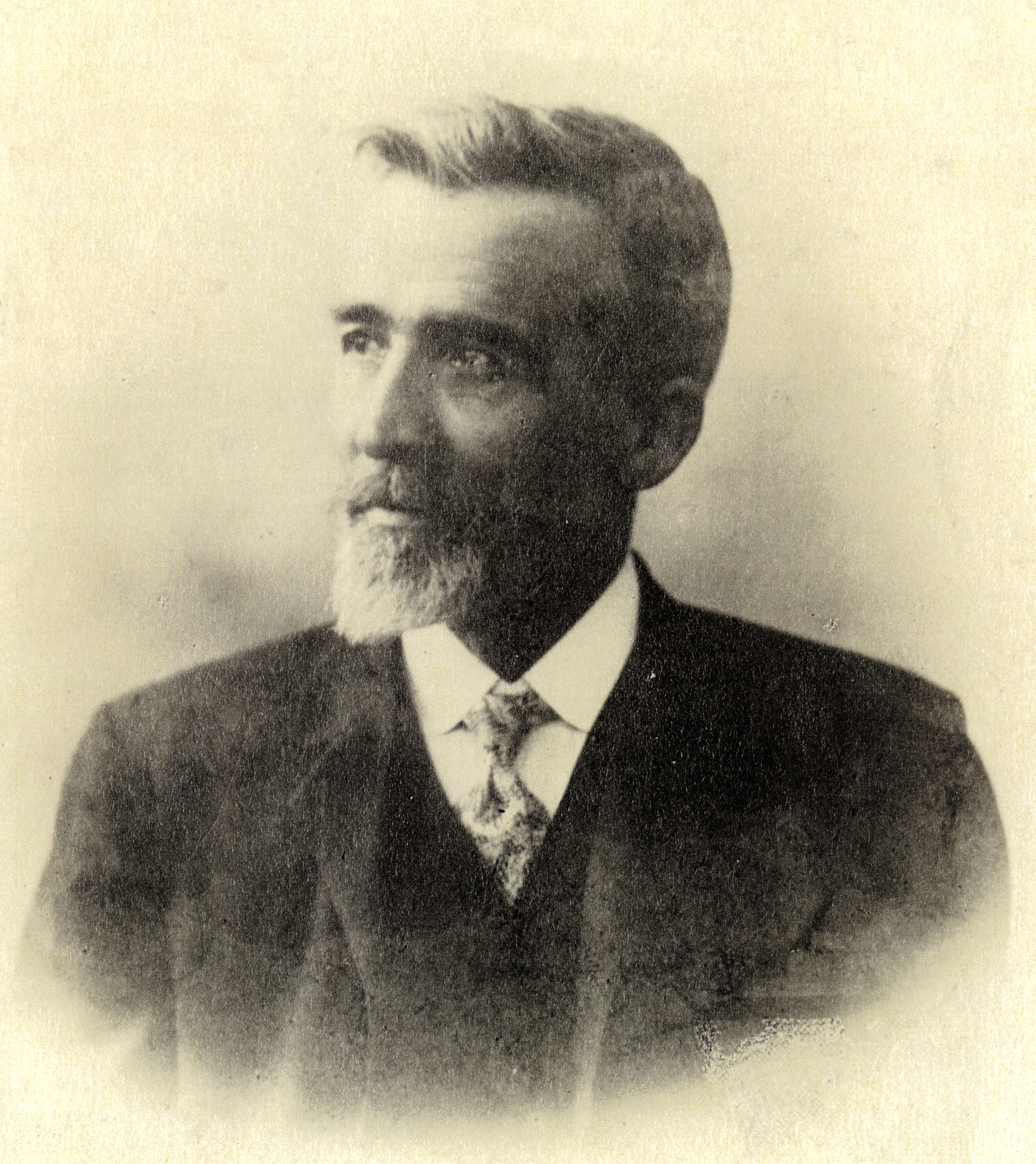 Pello Mari Otaño Barriola (1857/1910). Familak emandako argazkia.